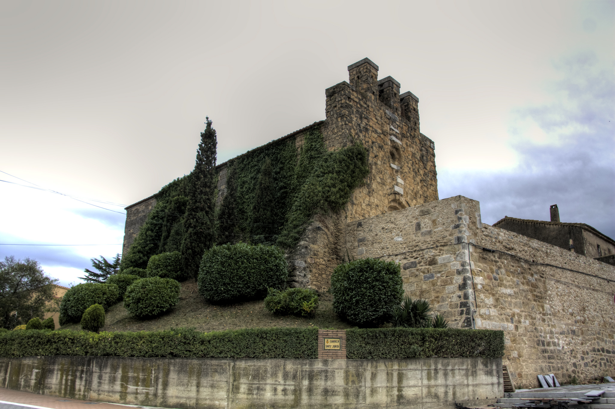 Església parroquial de Sant Vicenç de Vilamalla